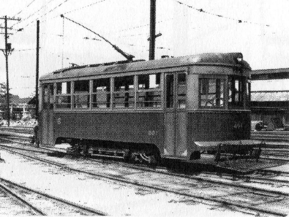 1940年ごろに撮影された広島瓦斯電軌（広島電鉄）の400形電車401号。